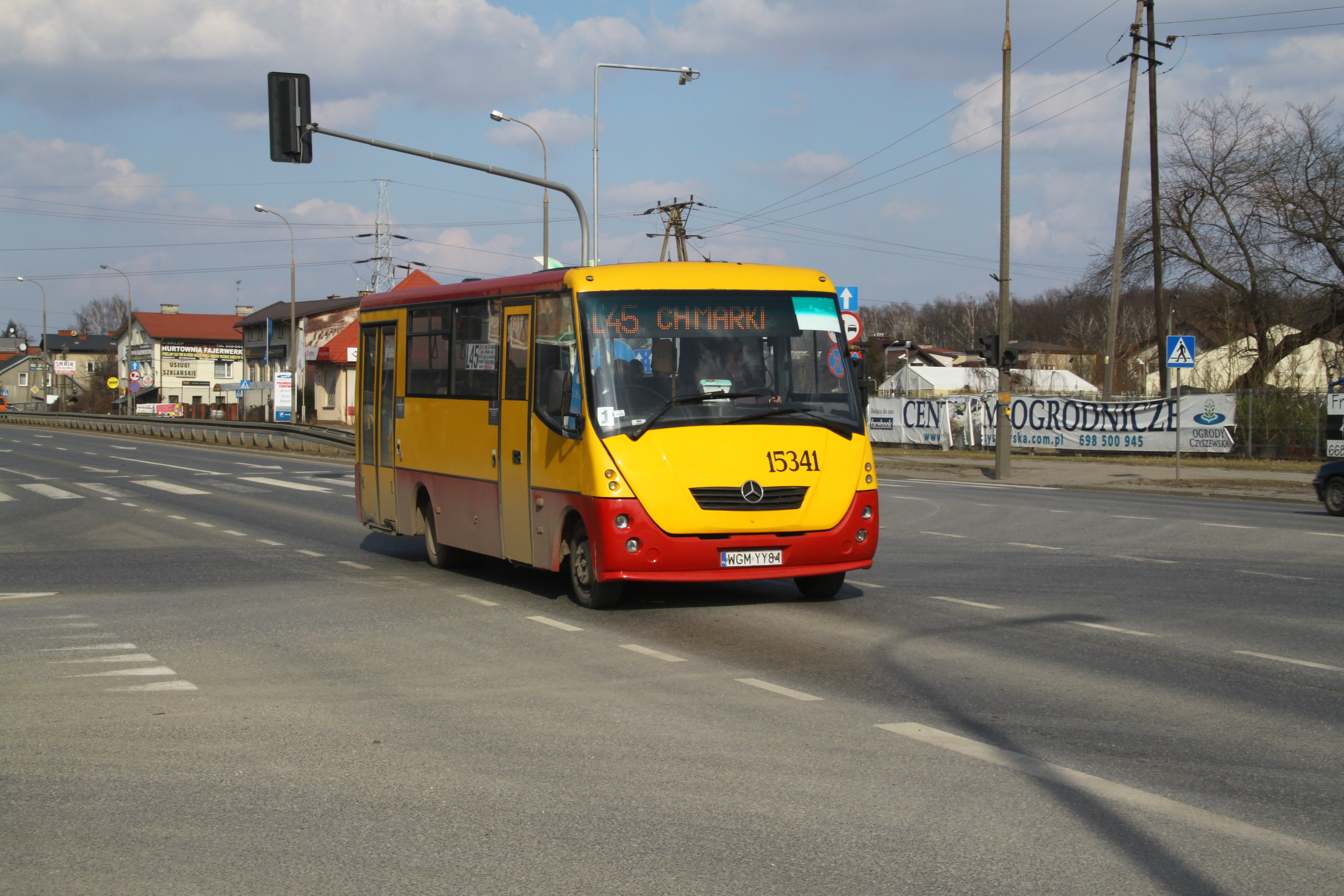 Autobus Autosan H7 (przewoźnik: PKS Grodzisk Mazowiecki) na linii L45 w Markach